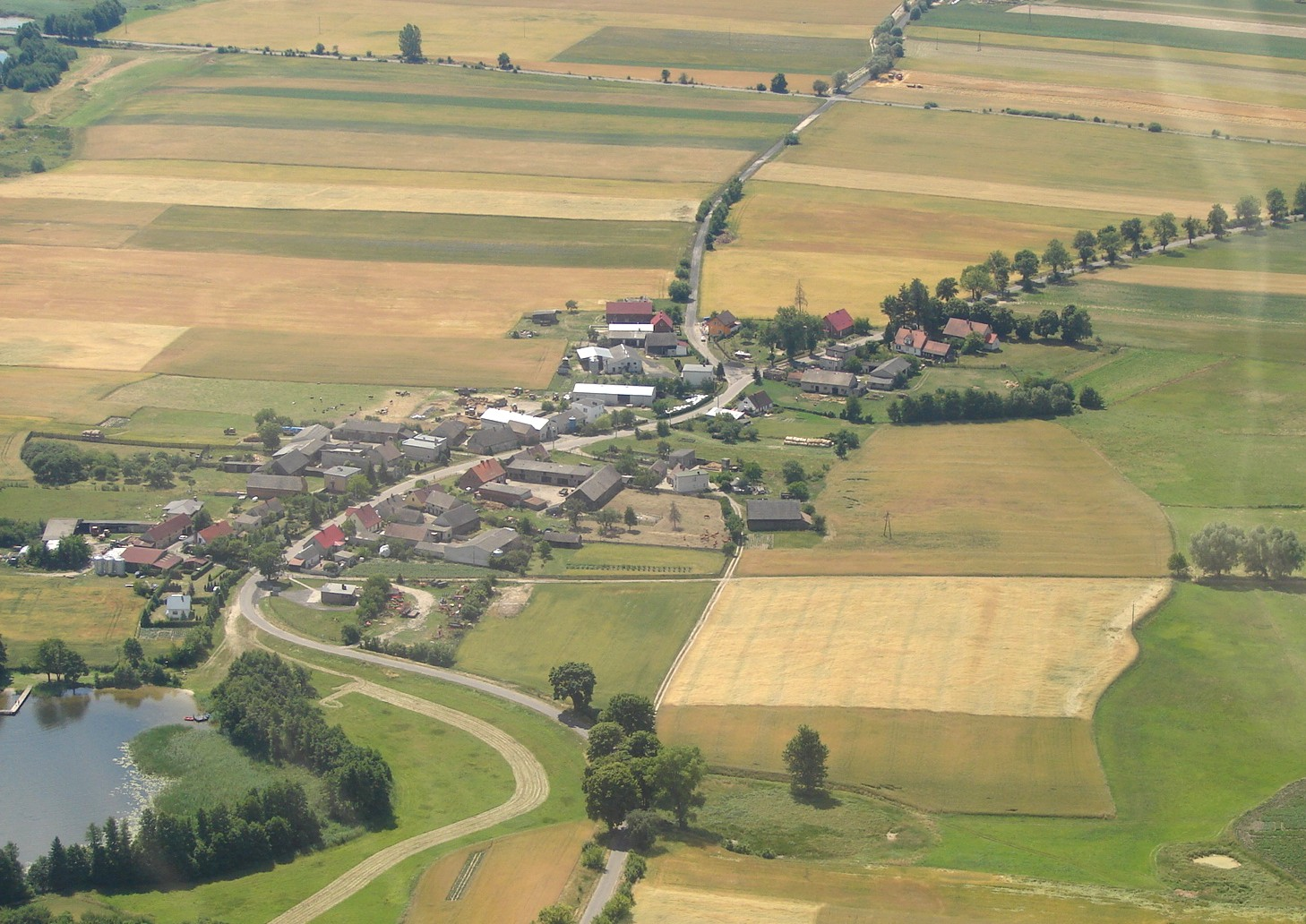 Zdjęcie lotnicze Buntowa